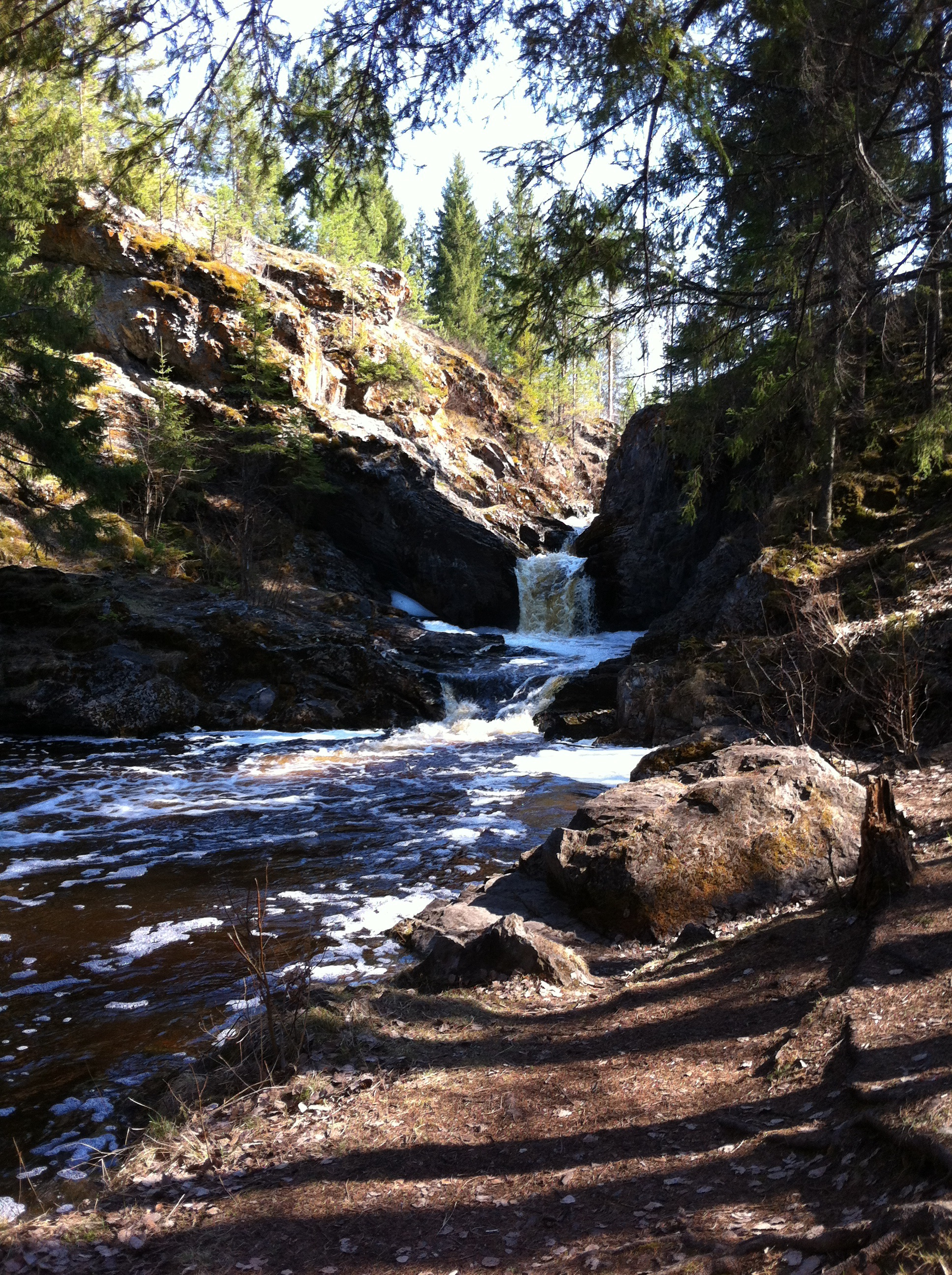 Кордюковский сероводородный источник, Верхотурский район This image is related to the protected area of Russia number 6610145